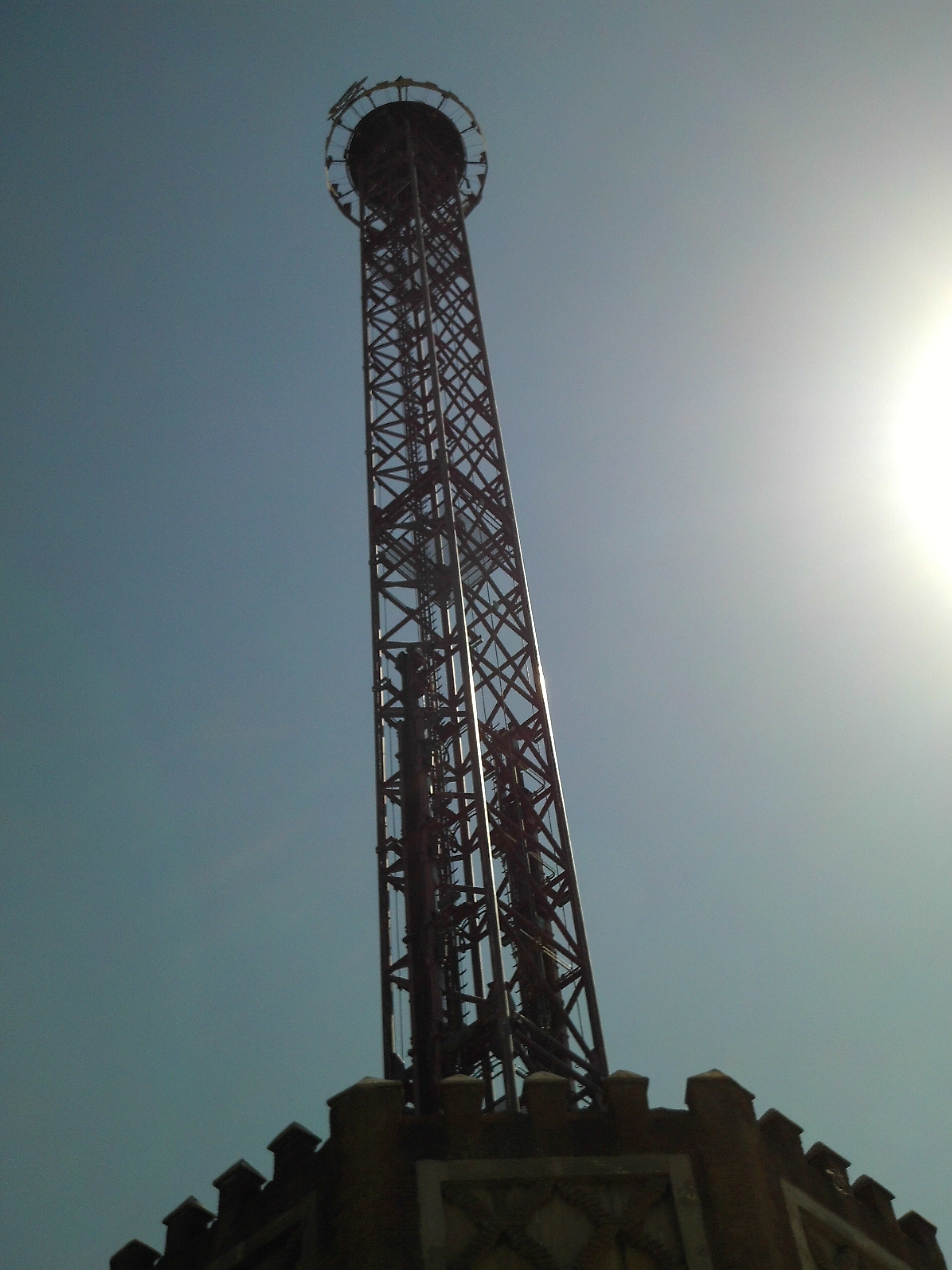 Atracción El Desafío, del parque temático Isla Mágica